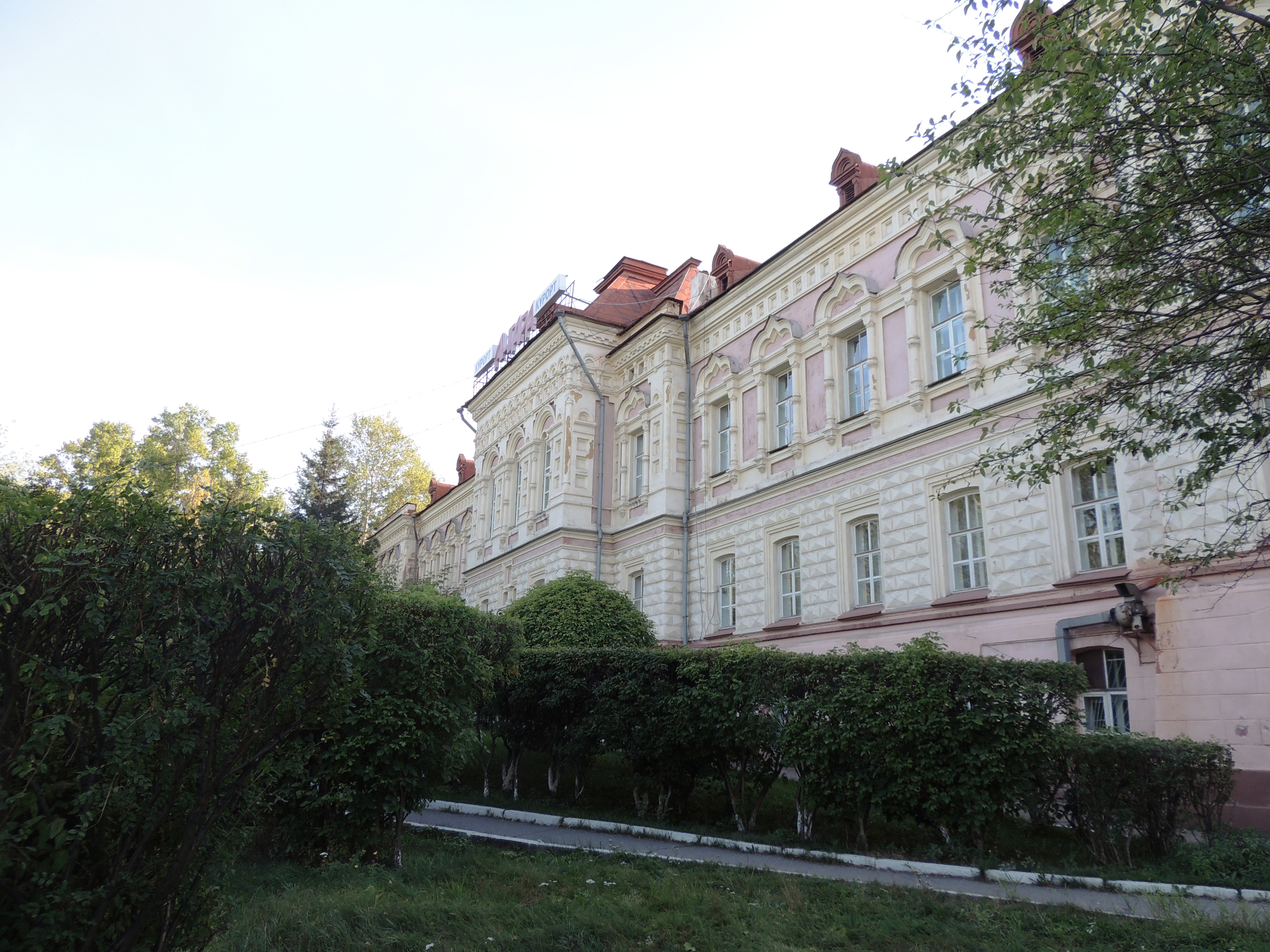 Больница для хроников (медведниковская) (Иркутская область, Иркутск, железнодорожная вторая улица, 4)